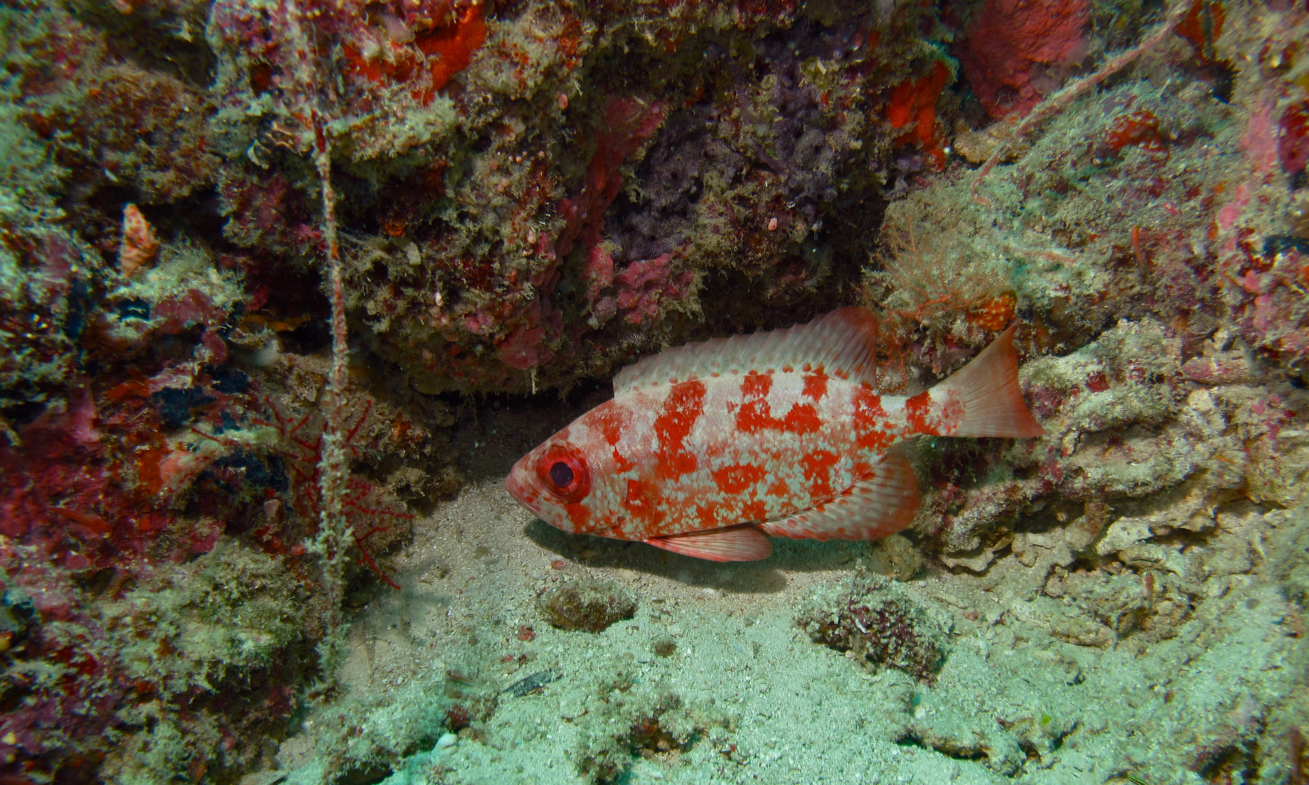 Stingray Alley, Pulau Mabul, Sabah, MALAYSIA